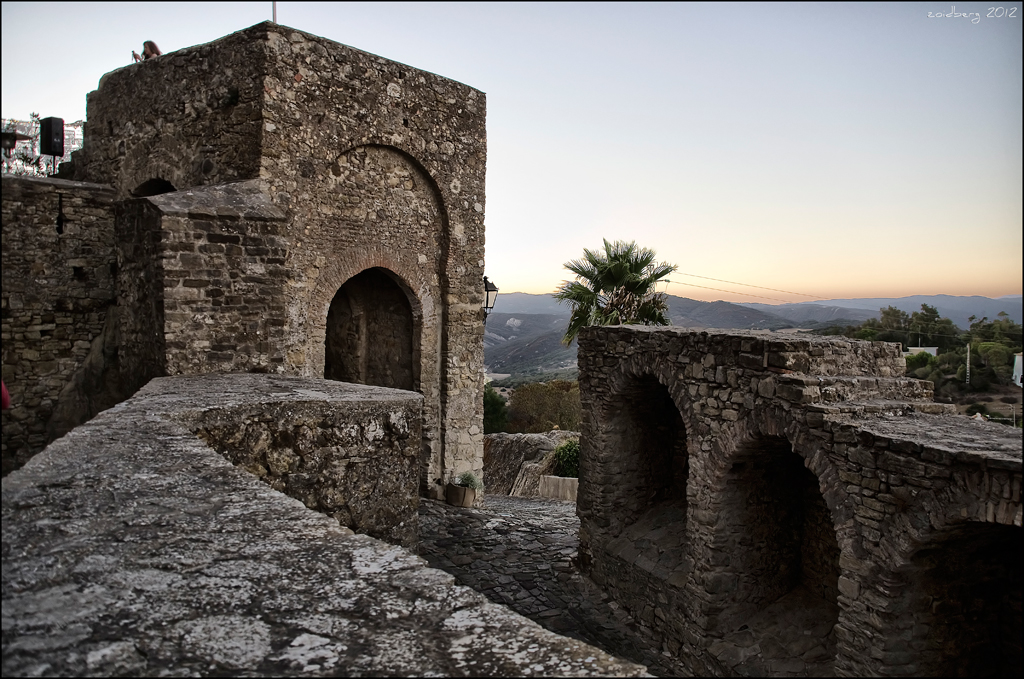 Castillo de Castellar